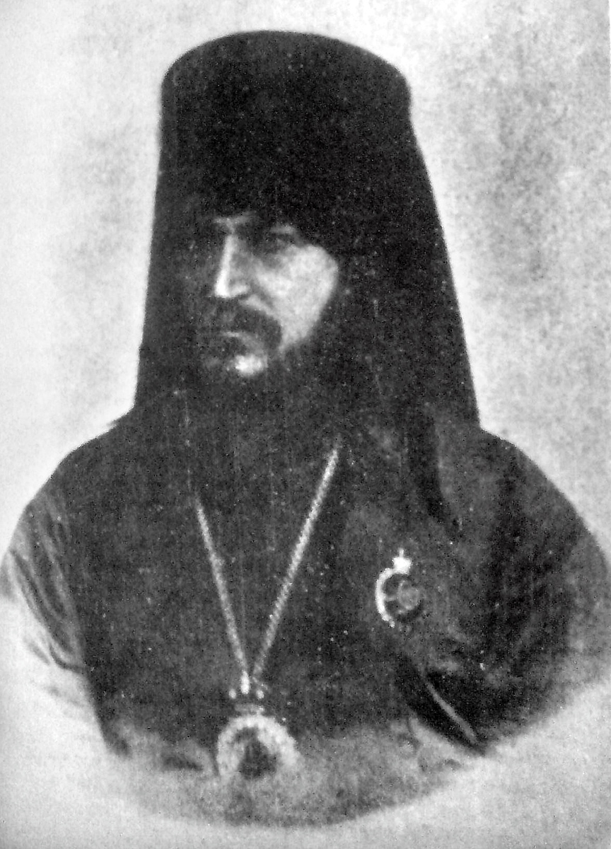 biskup Herman (Iwanow)